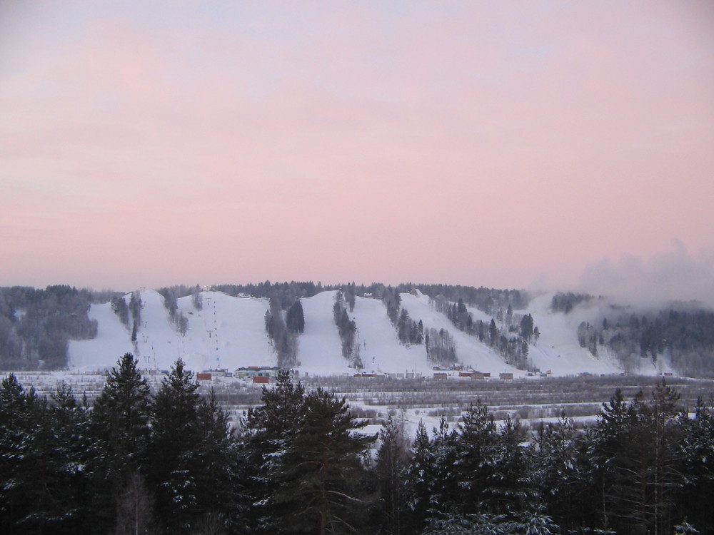 La vido ekde la Svetloje radioteleskopo RTF-32 sur la vintrostacioj Zolotaja-dolina kaj Sneĵnij.